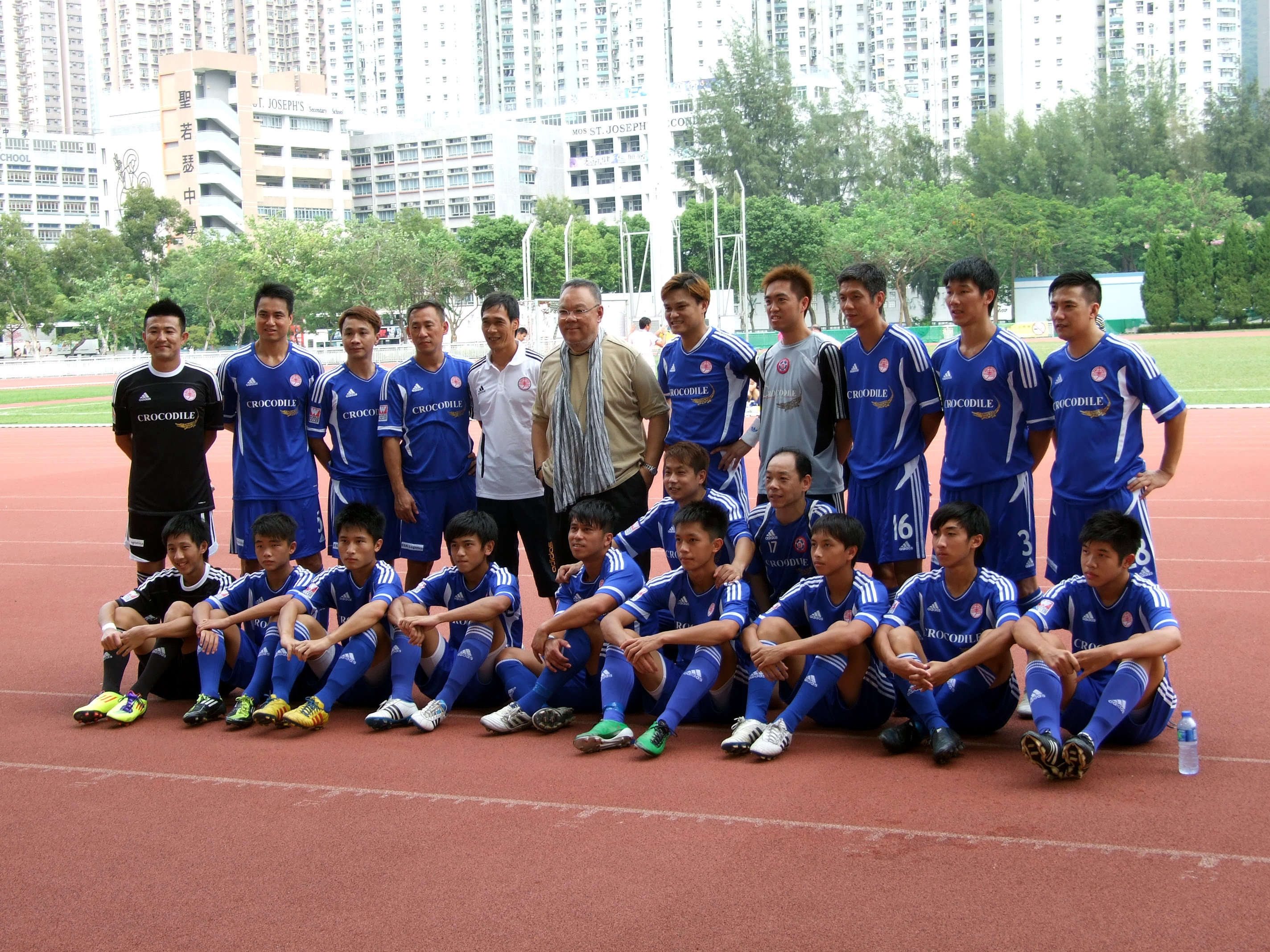 中文（香港）: 2011/12年球季東方大合照